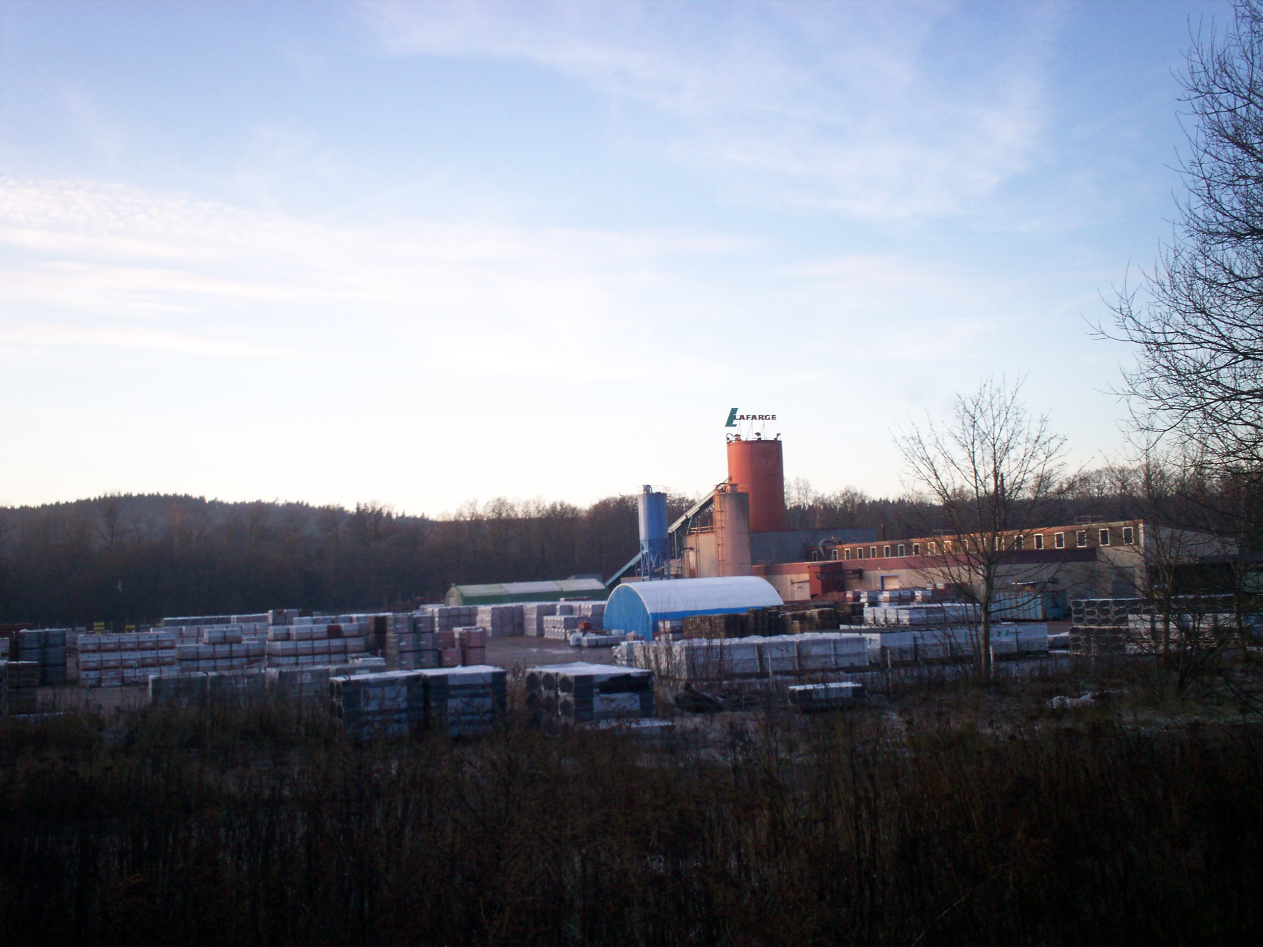 Takpannefabriken i Sennan